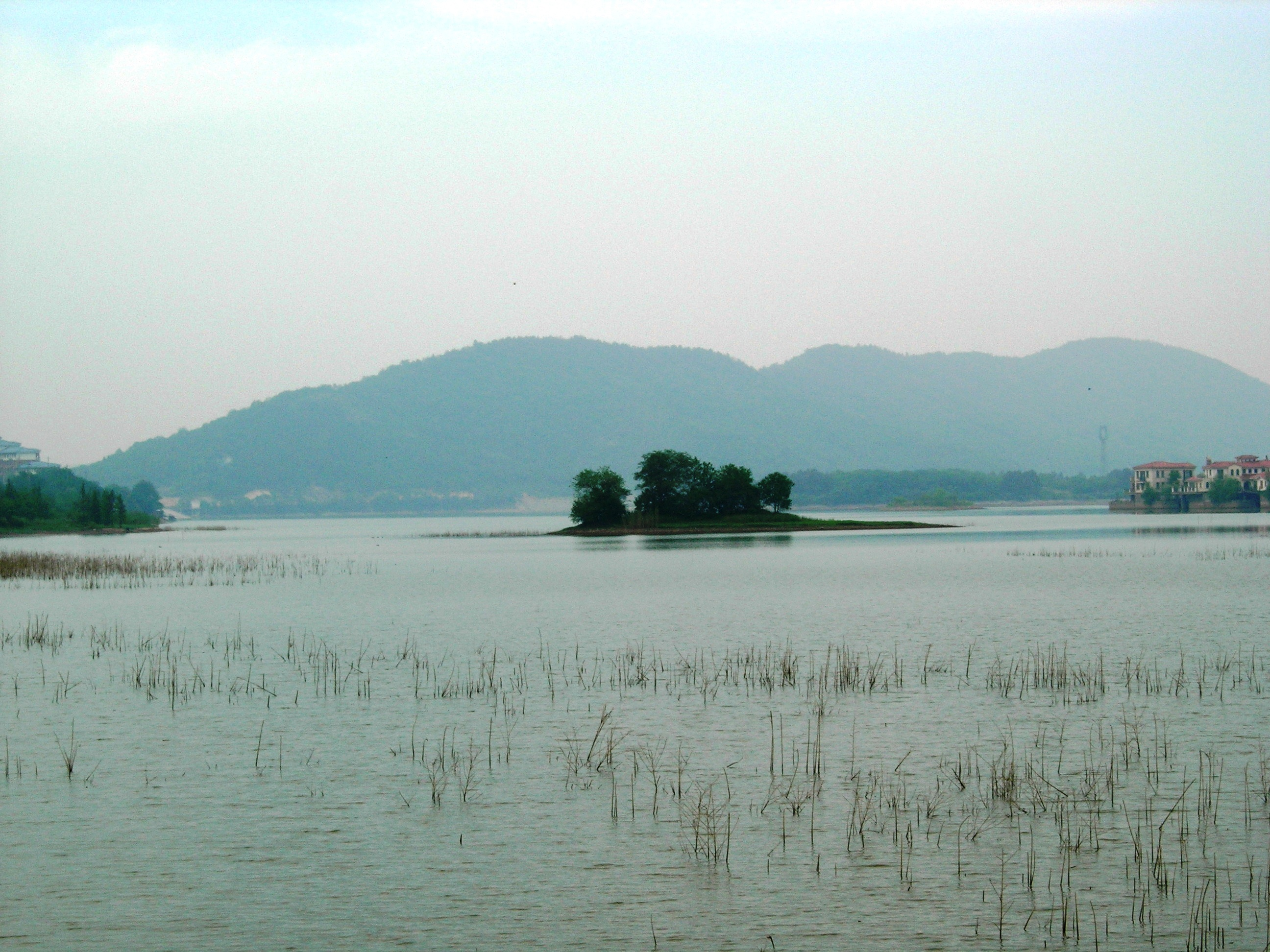 安徽省巢湖市和县香泉湖景色